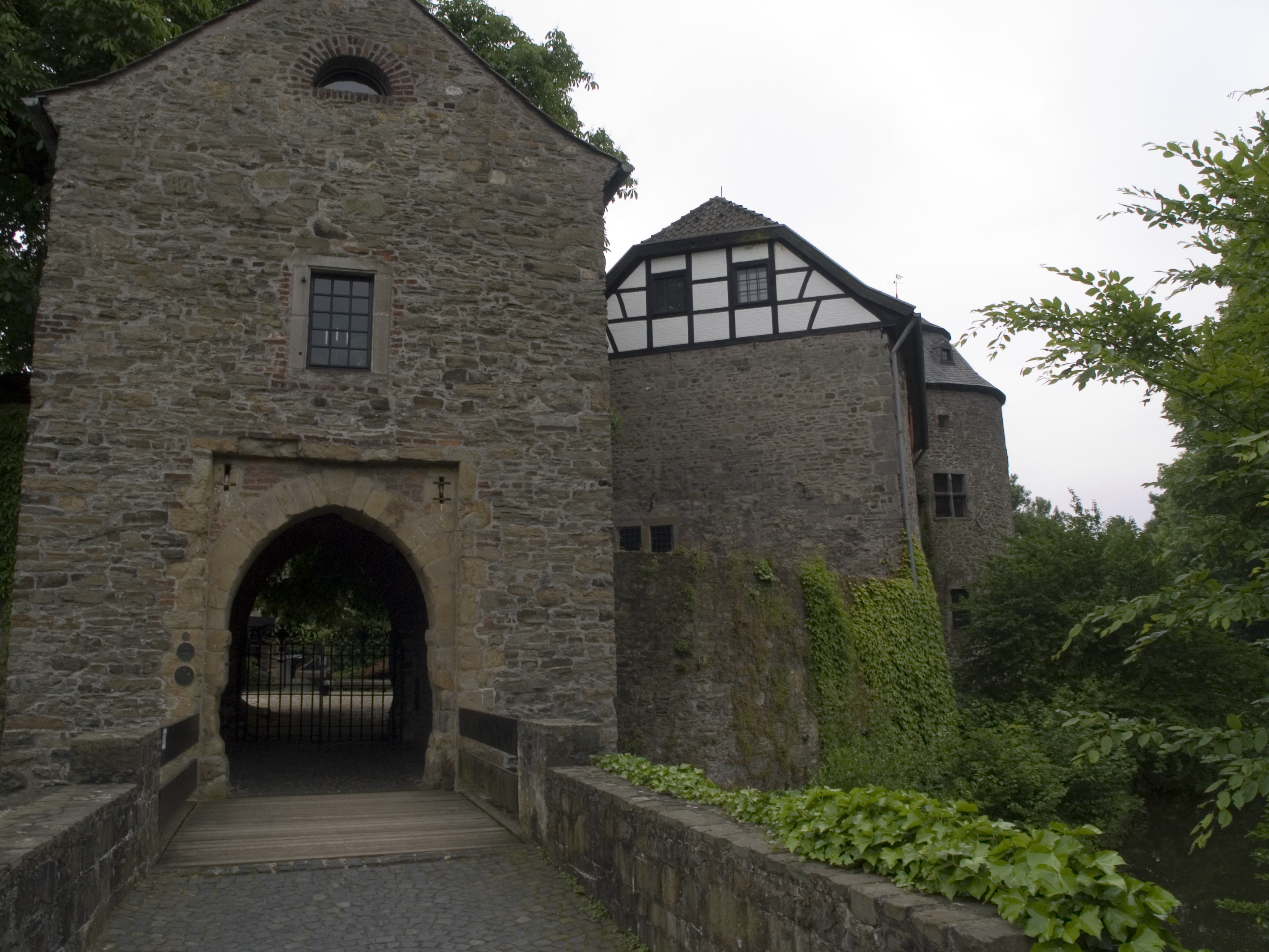 Северный Рейн-Вестфалия, Ратинген - Замок Хауз